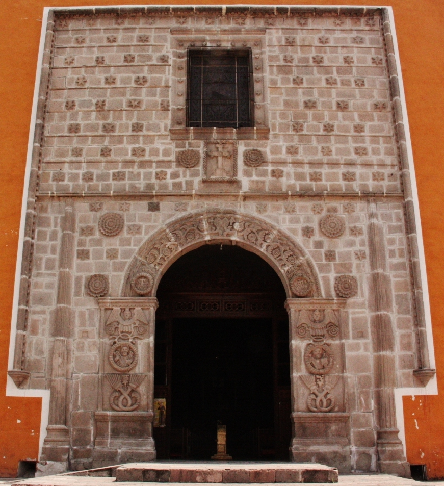 Templo del Hospital, Acámbaro, Estado de Guanajuato, México